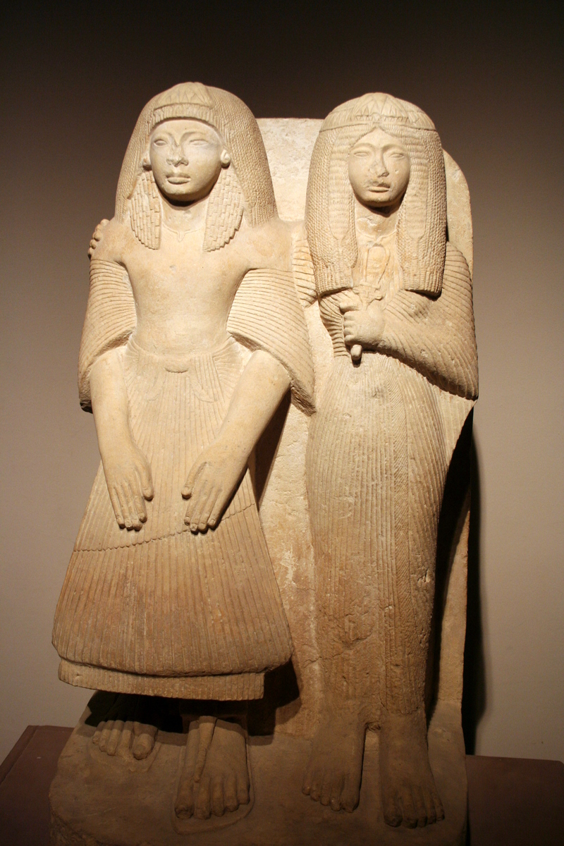 Statut d'Amenemipet et de son épouse (XIXème dynastie), musée Imhotep à Saqqarah